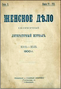 Журнал А. Н. Пешковой-Толиверовой "Женское дело", июнь-июль 1900 г.